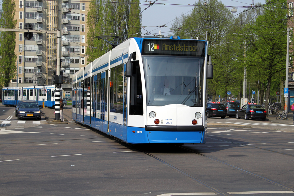 GVB tram type Combino C1, wagen 2094, lijn 12, Julianaplein (Amsterdam)